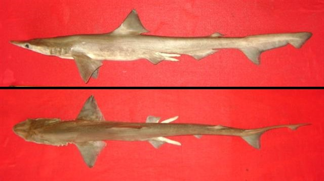 Pakistan, Karachi, 20-5-2013, 50 cm